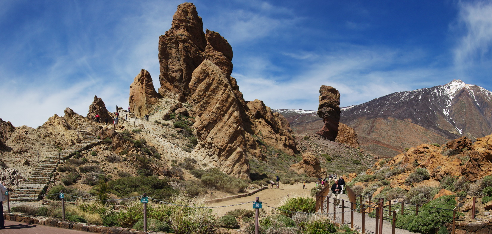 Felsformation Los Roques und Teide, Teneriffa